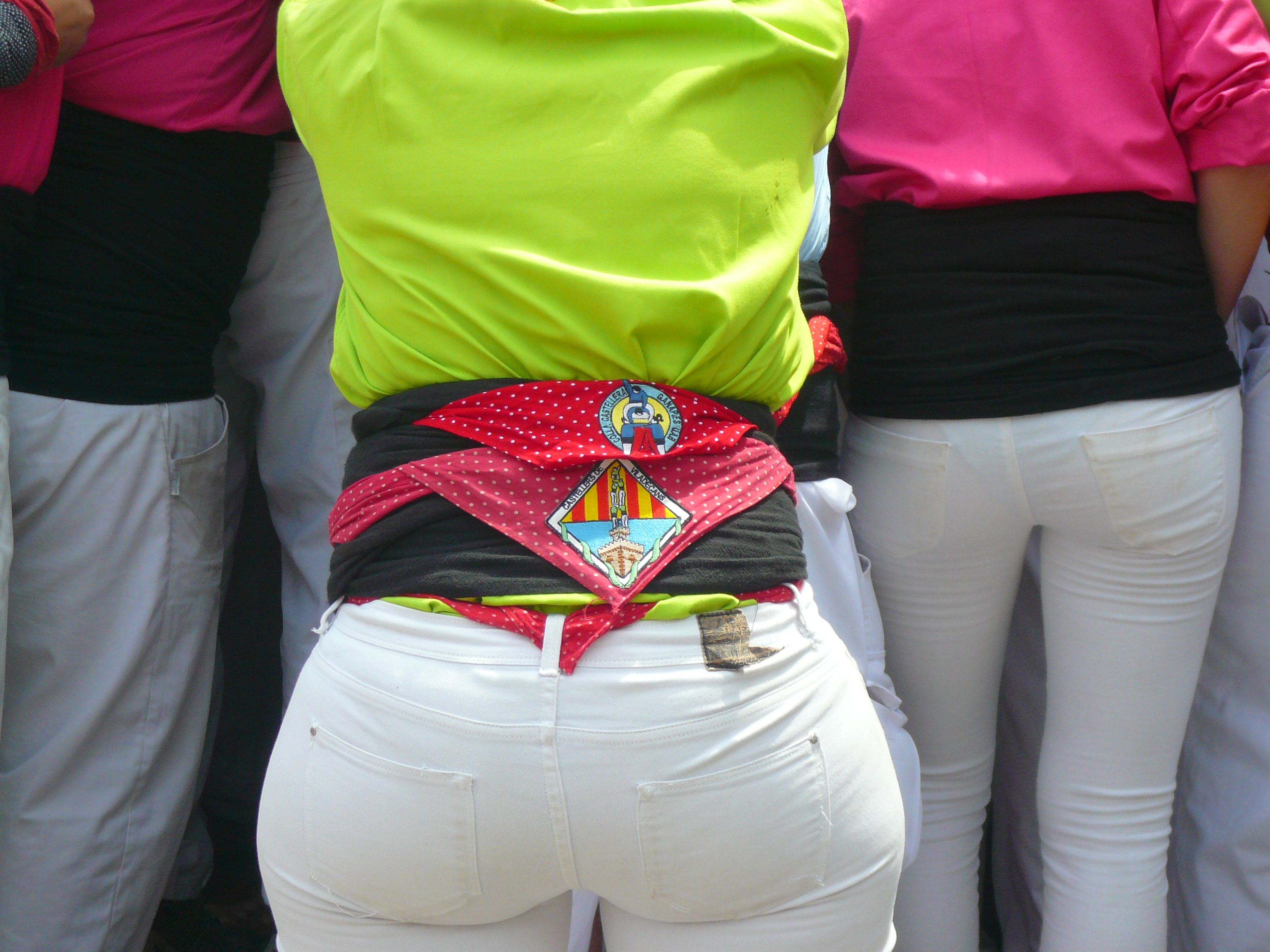 Diada castellera de les festes de primavera del 2014 a Sant Feliu de Llobregat. Hi actuaven els Castellers de Sant Feliu (camisa rosa), els Castellers de Viladecans (camisa verda) i els Castellers de Santa Coloma (camisa blau cel).